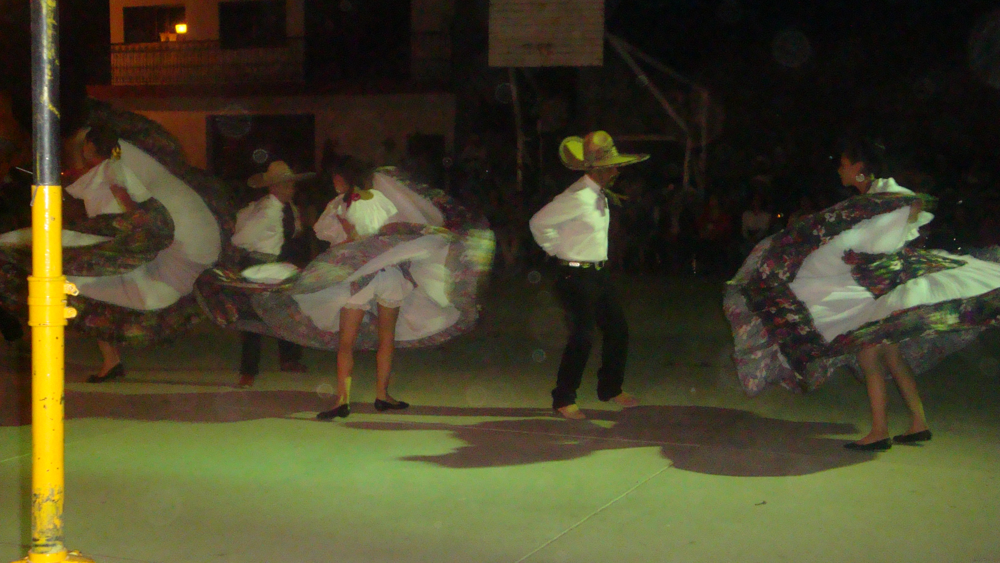 el balet reinaldo segura